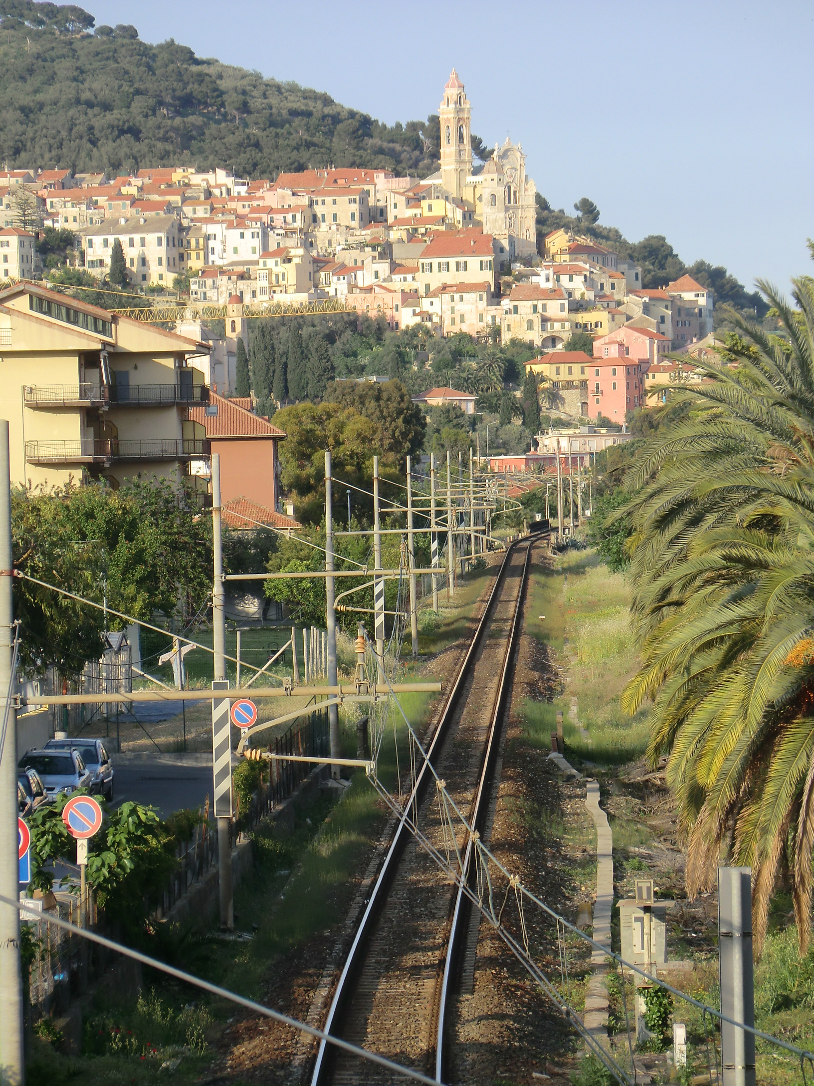 LInea Ferroviaria Genova - Ventimiglia tra San Bartolomeo al mare e Cervo